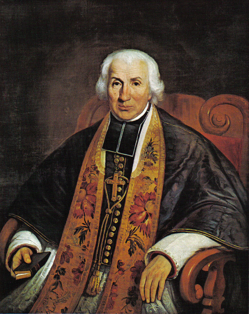 Portrait of Monseigneur Joseph Signay